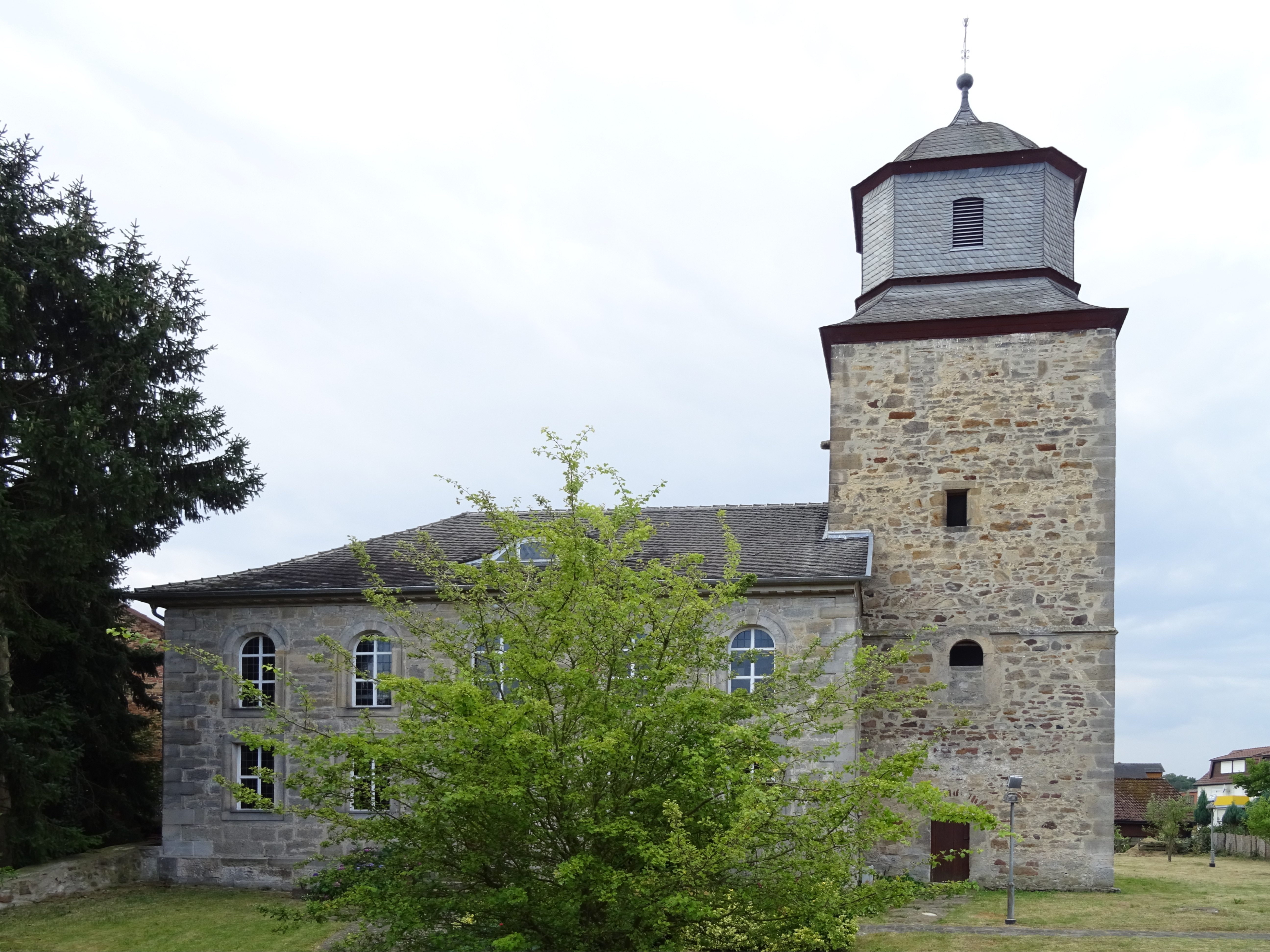 Südseite